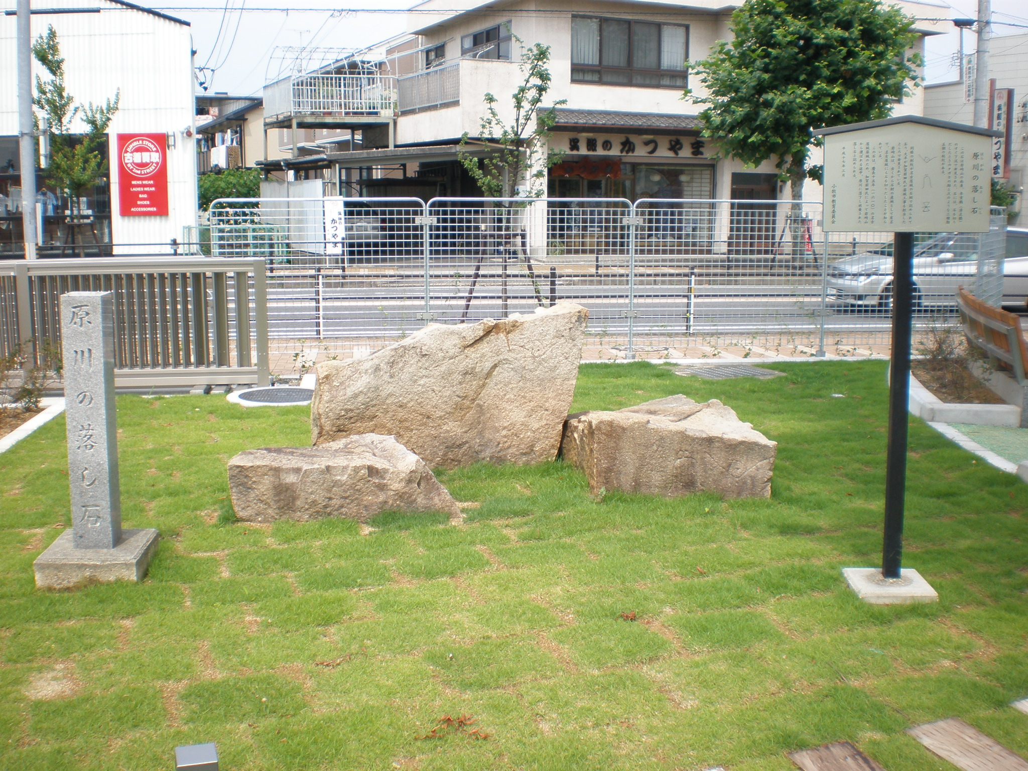 愛知県小牧市の小牧市民会館・公民館内にある原川の落し石